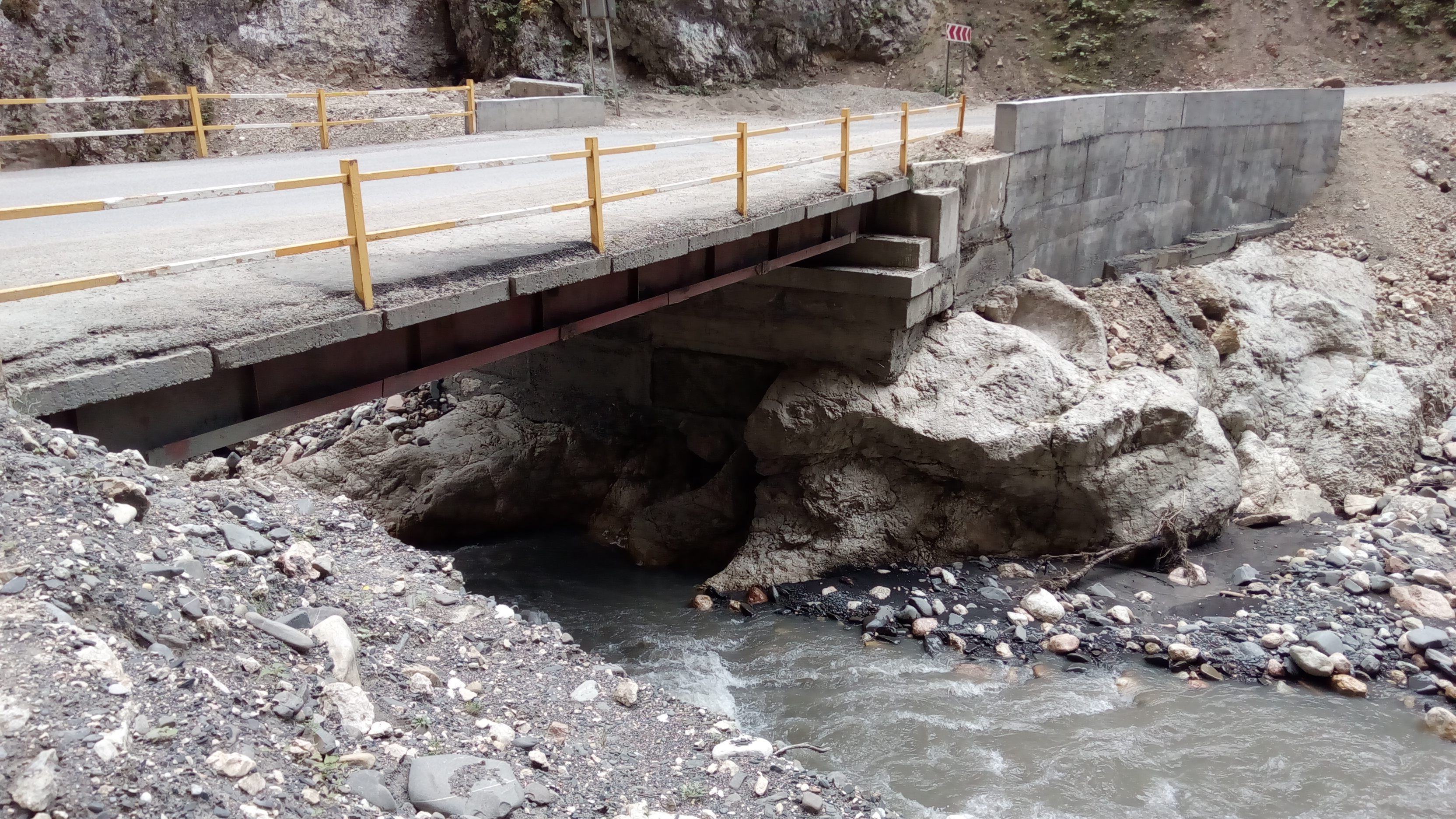 Quba-Xınalıq yolu, Cek kanyonu